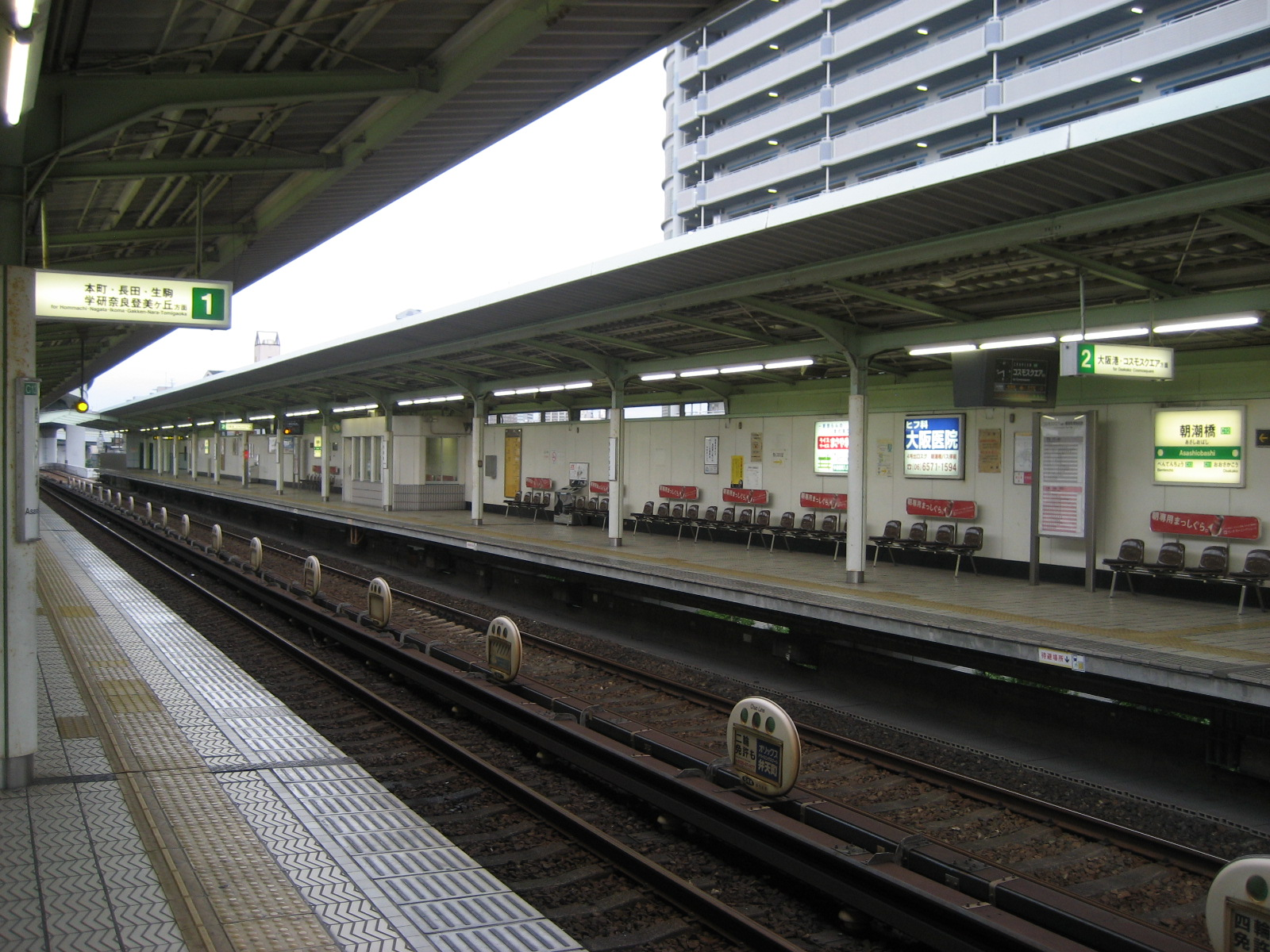 3 Chome Tanaka, Minato-ku, Ōsaka-shi, Ōsaka-fu 552-0005, Japan